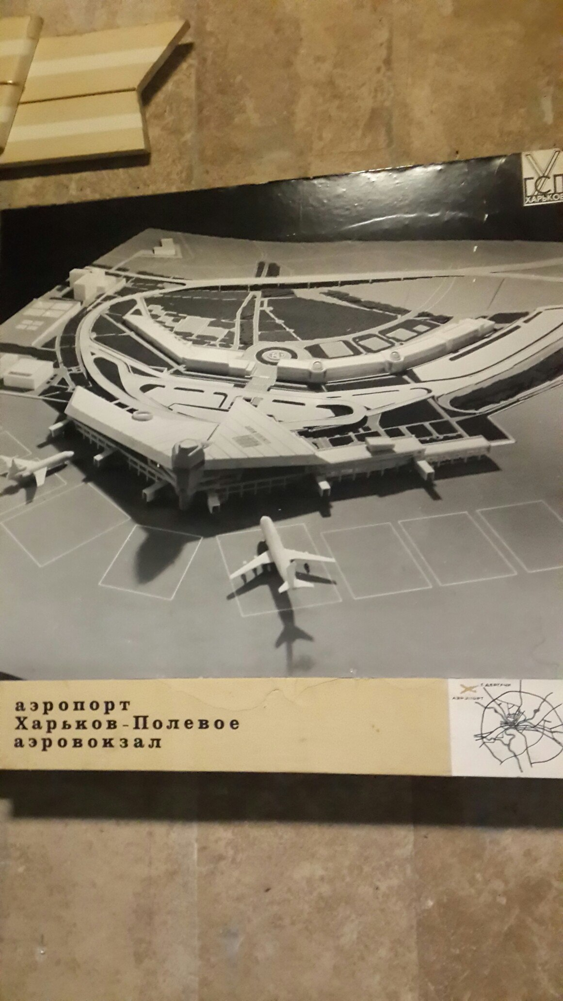 Фото аэровокзала аэропорта "Харьков-Полевой"